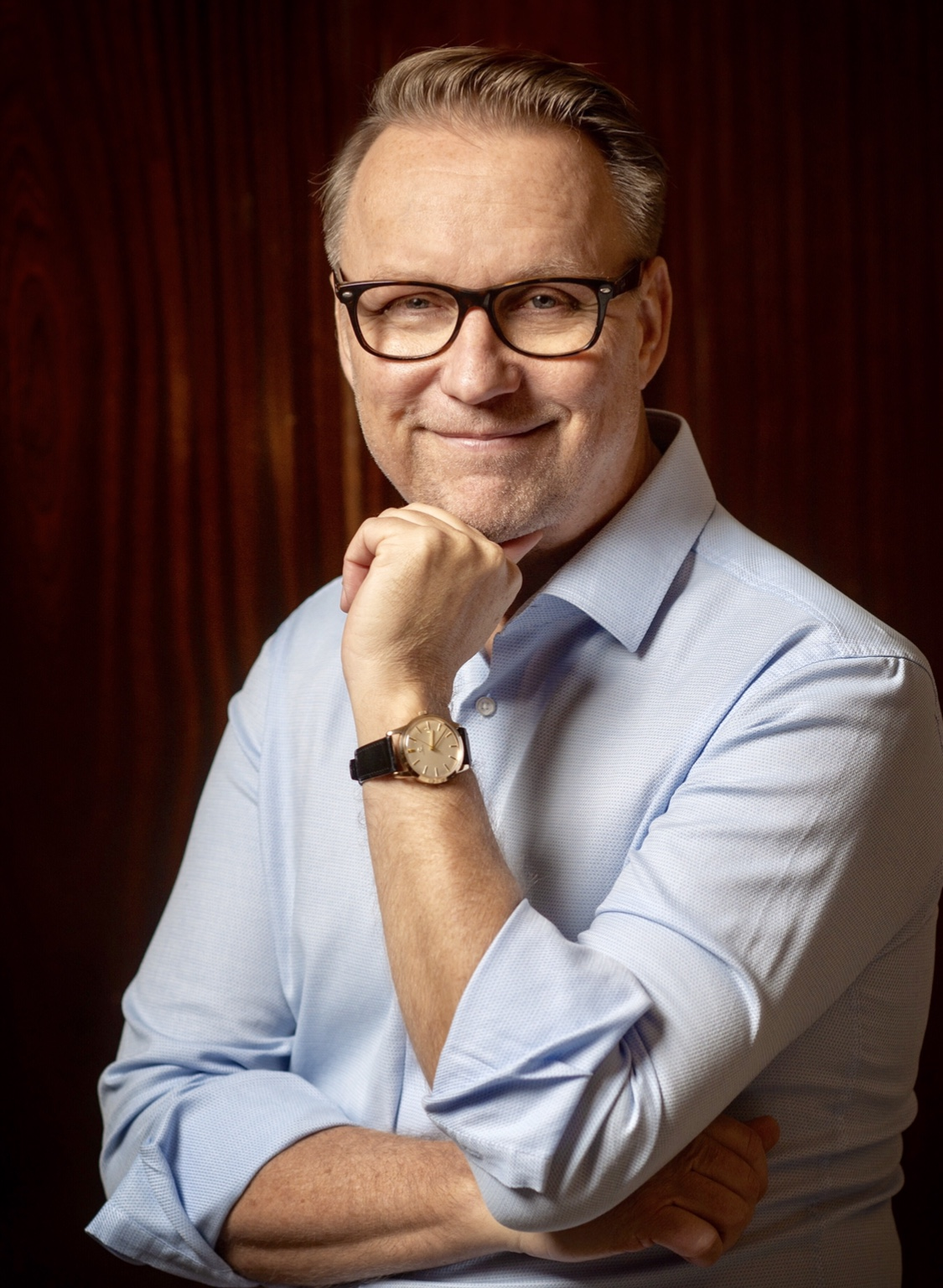 Mika Walkamo, 2019